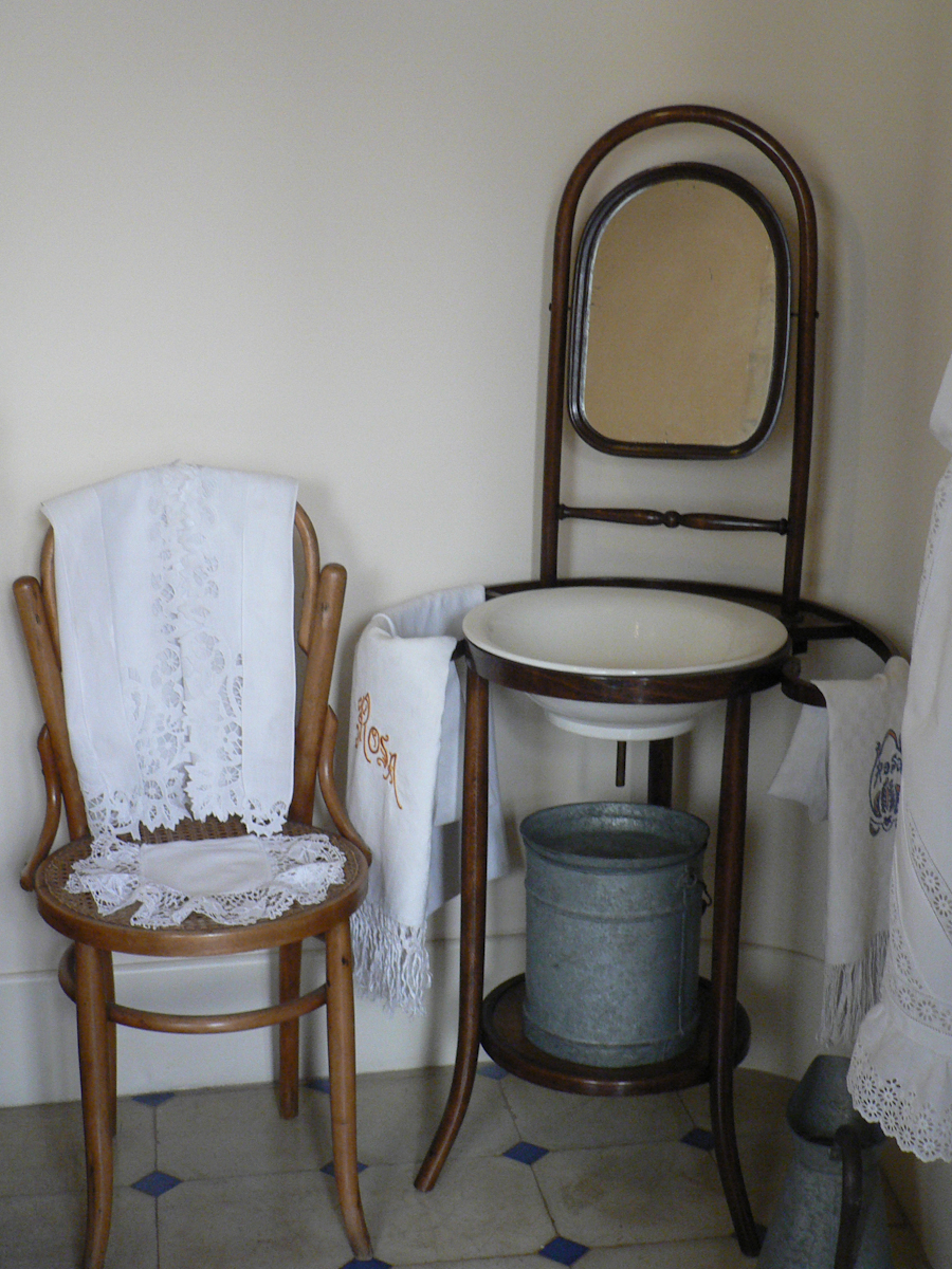 Barcelona Piso 1497 07 de julio de 2011